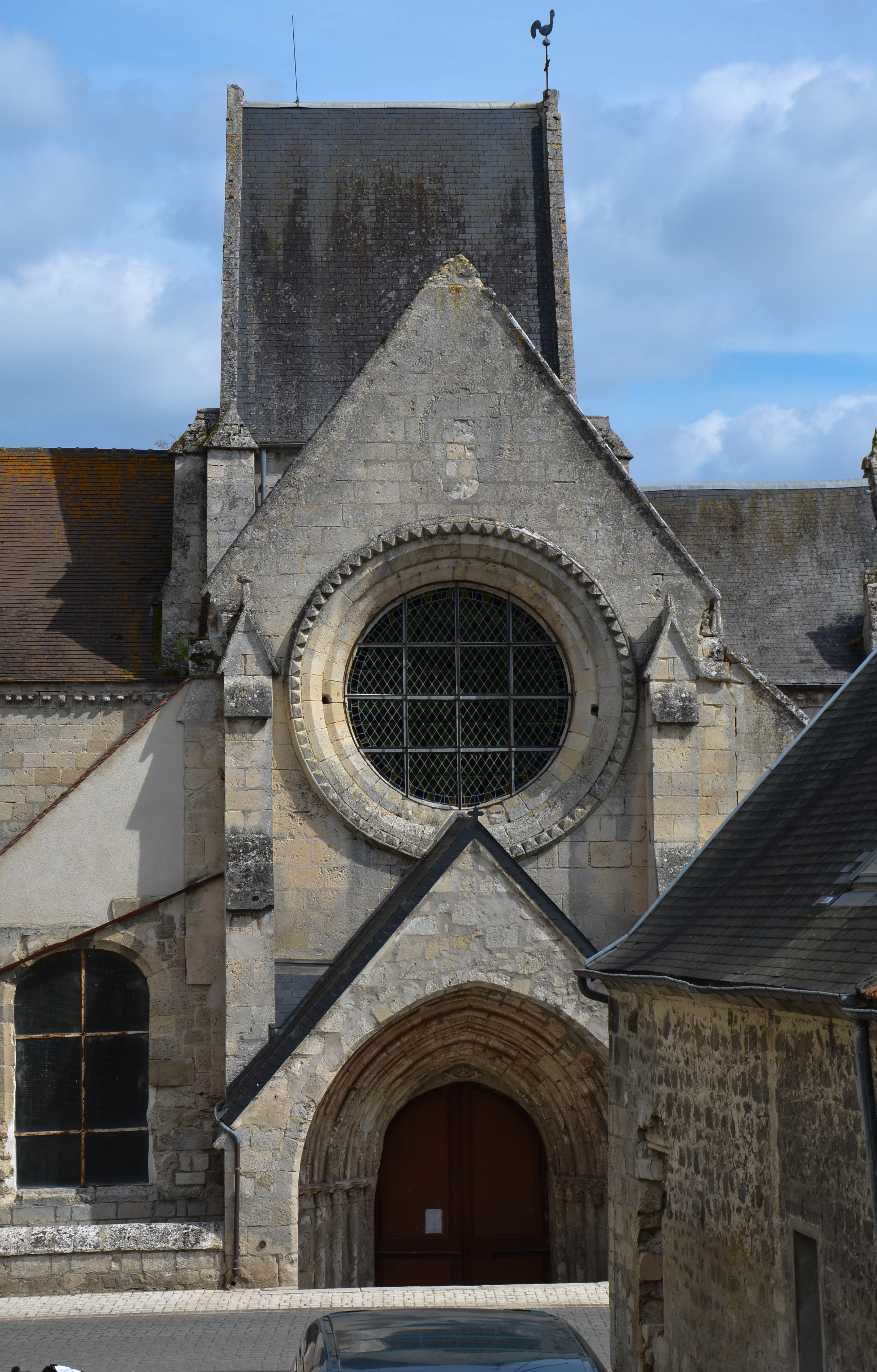 Façade occidentale, donnant sur la rue de l'Église.